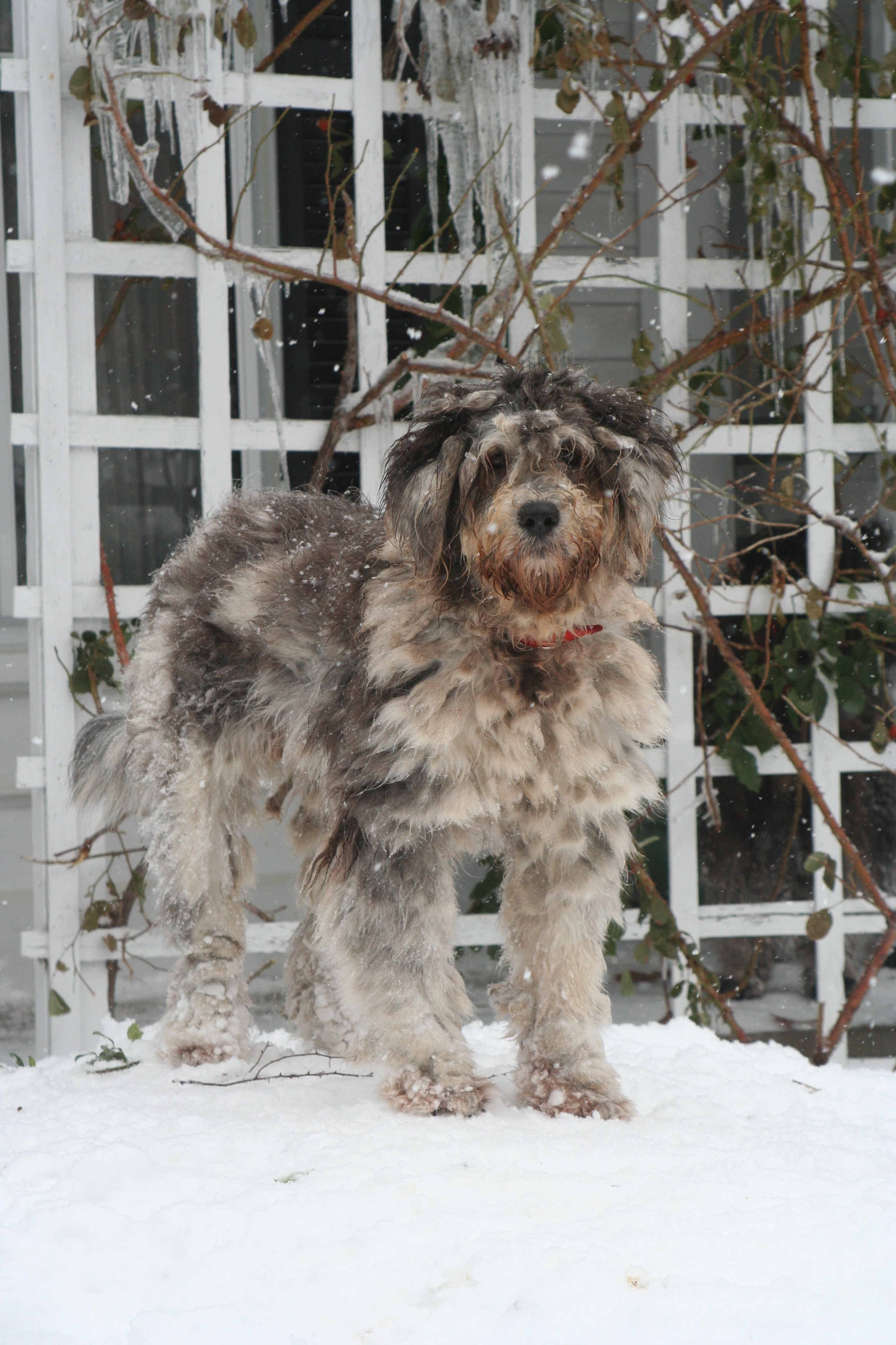 Juvenile Bergamasco sheepdog (merle)